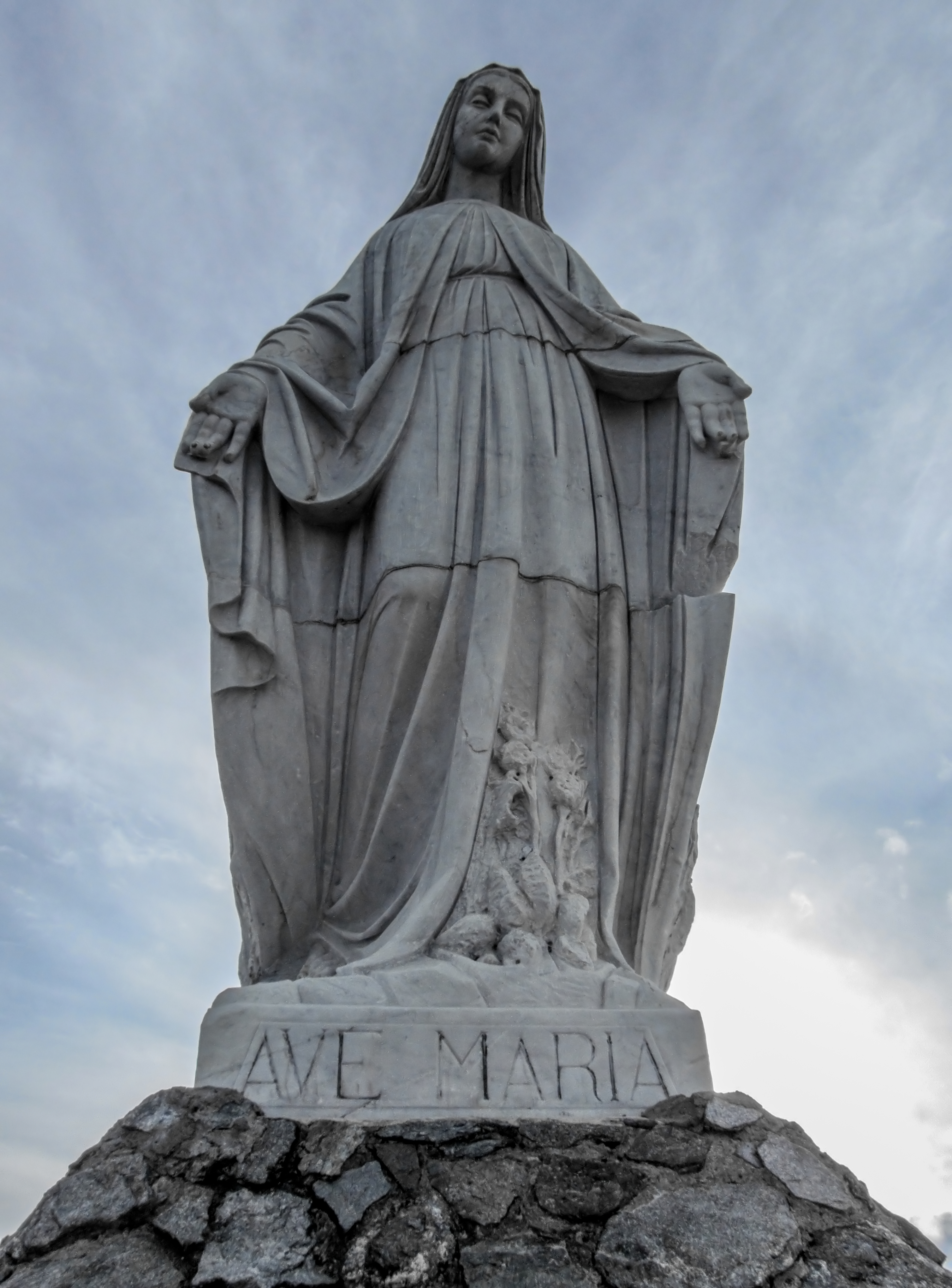 Estación Pico Espejo del Teleférico de Mérida Venezuela